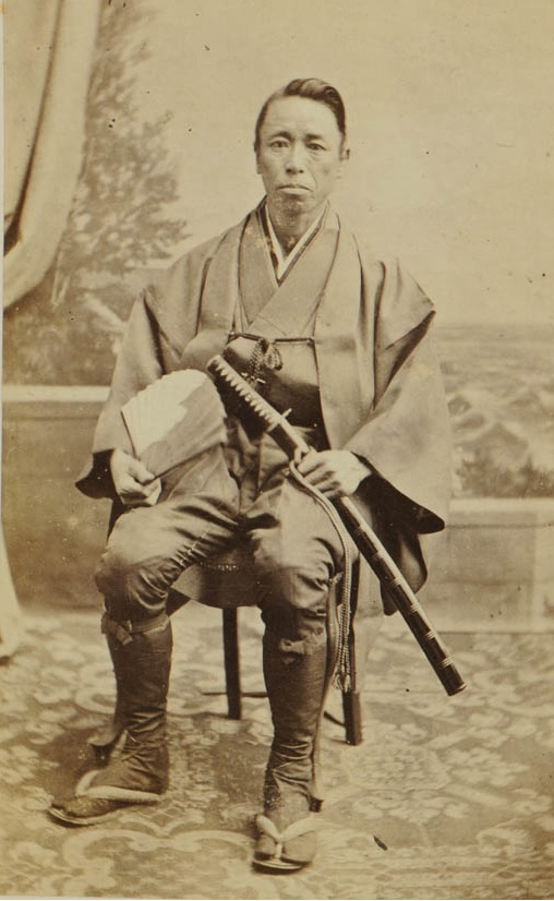 上田寅吉。1864年オランダにて